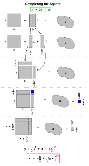 Kvadratkomplettering.